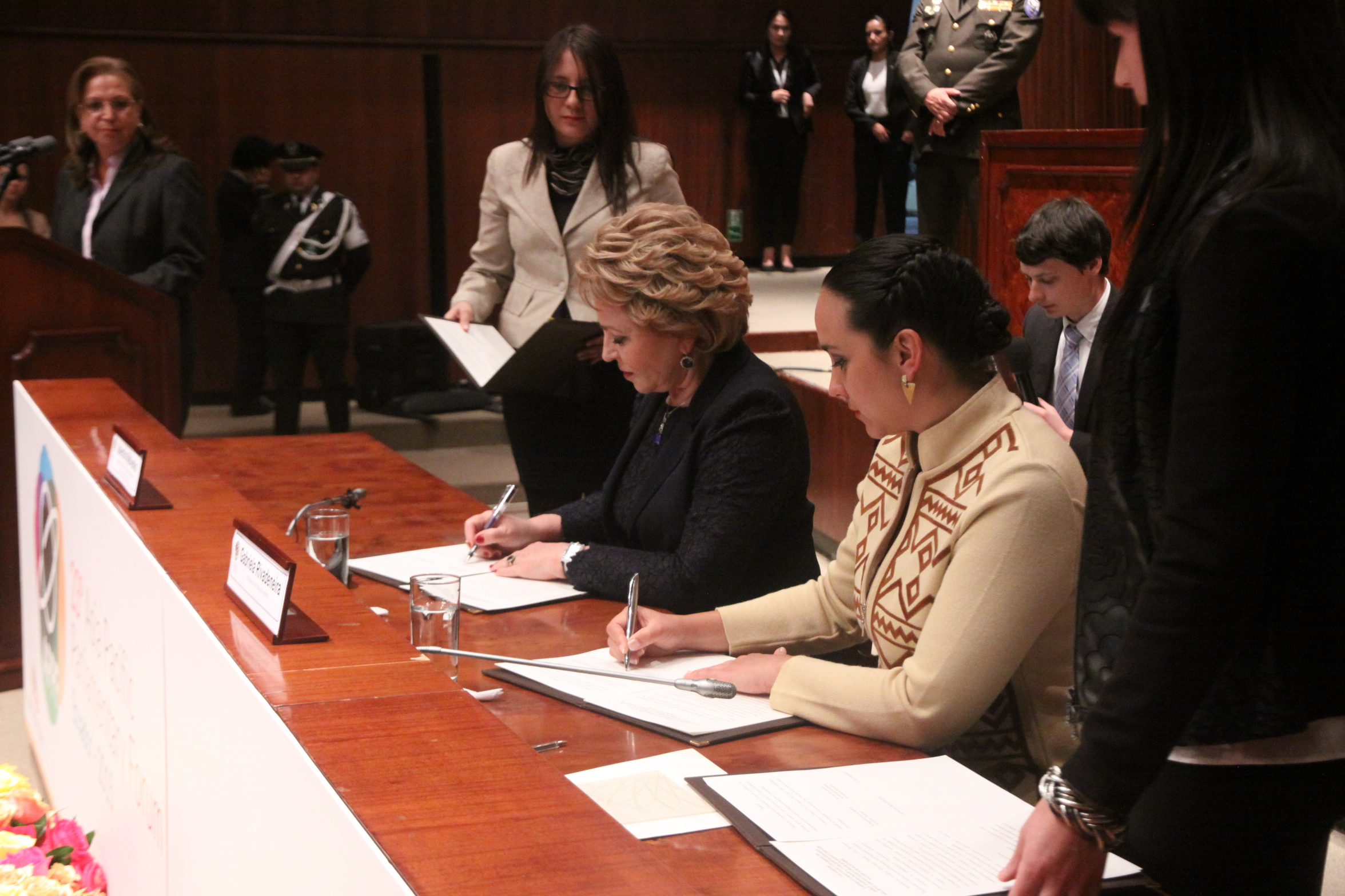 Quito, 12 enero de 2015.- Gabriela Rivadeneira y Valentina Matvienko ofrecen rueda de prensa y suscripción del Acuerdo de Cooperación entra la Asamblea Nacional de la República del Ecuador y el Consejo de Federación de la Asamblea Federal de la Federación de Rusia Fotografía: Hugo Ortiz / Asamblea Nacional